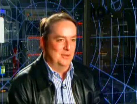 Brad Wright lors d'une entrevue de l'US Air Force News Agency à propos de Stargate : Continnum.